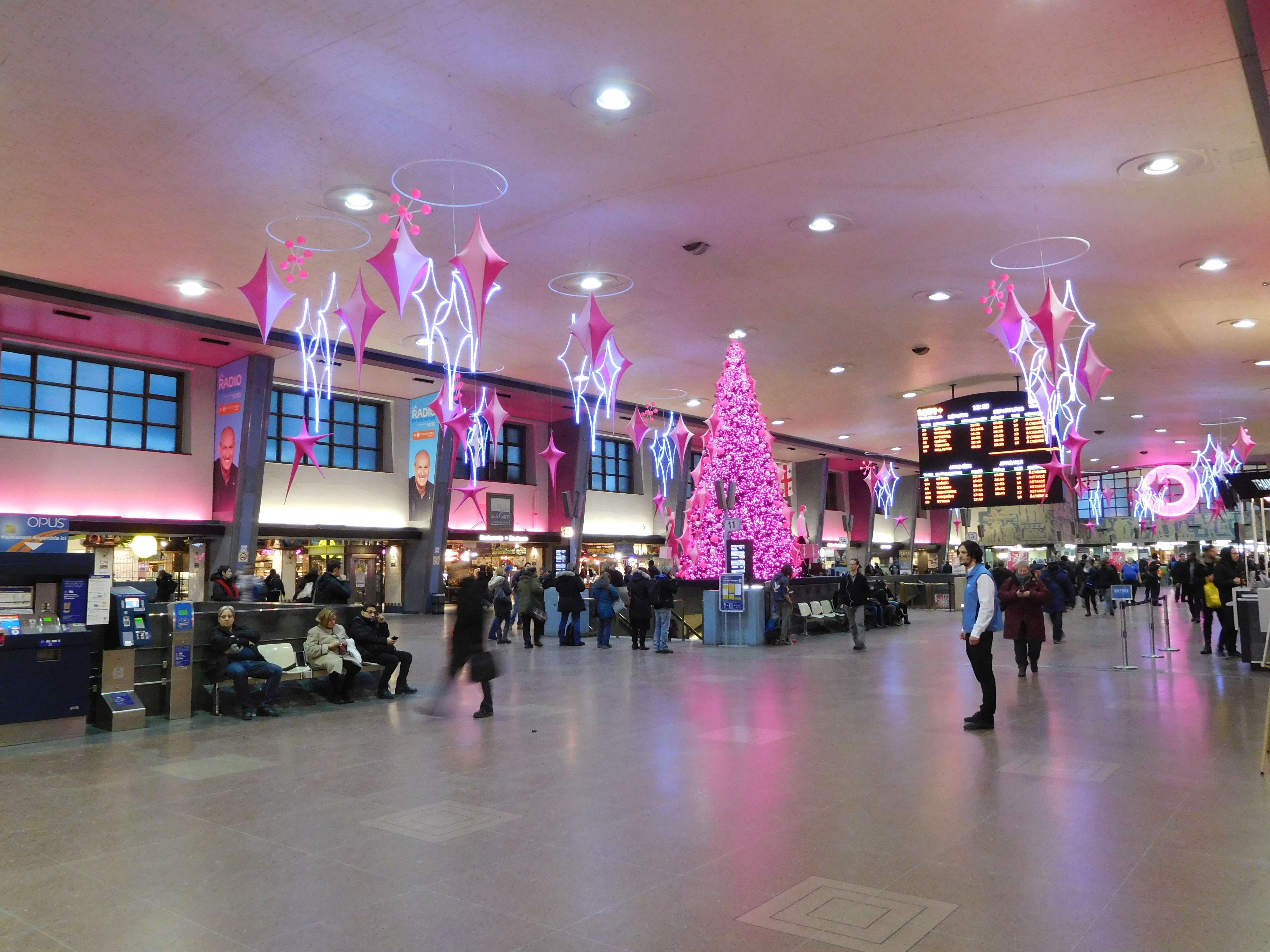 Salle des pas perdus de la gare centrale de Montréal